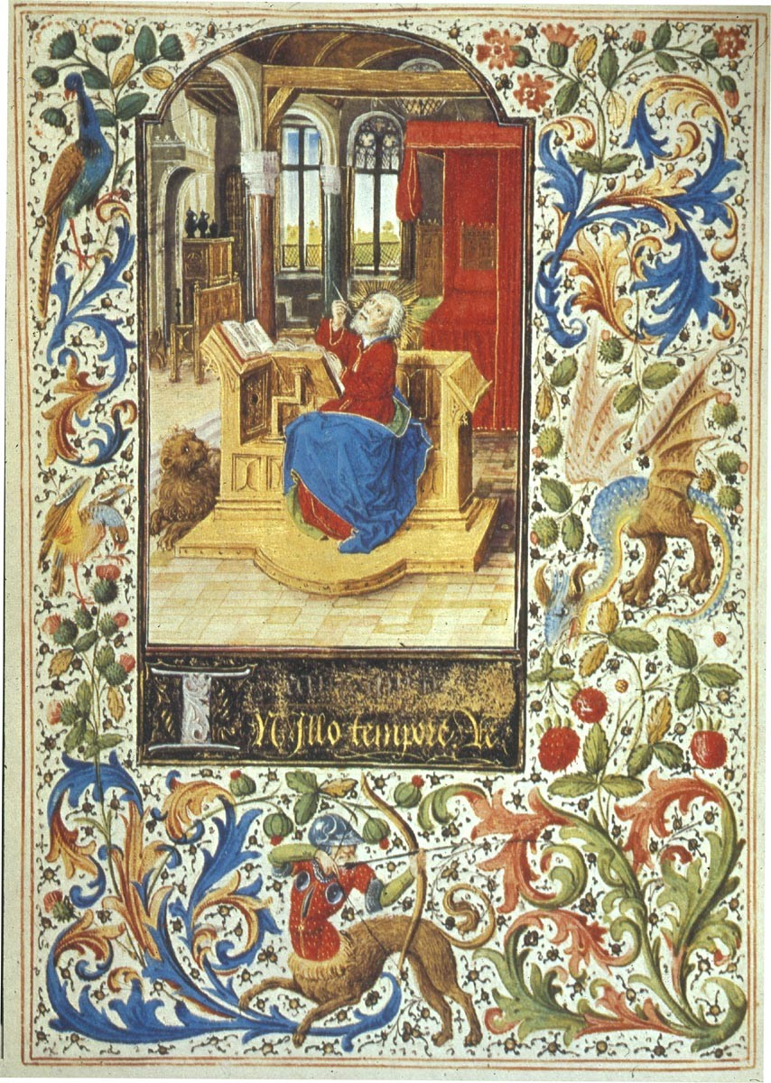 Wien, Österreichische Nationalbibliothek, cod. 1857, Stundenbuch der Maria von Burgund. In: Franz Unterkirchner (Hrsg.): Das Stundenbuch der Maria von Burgund. Codex Vindobonensis 1857 der Österreichischen Nationalbibliothek (Glanzlichter der Buchkunst), Darmstadt 1993.